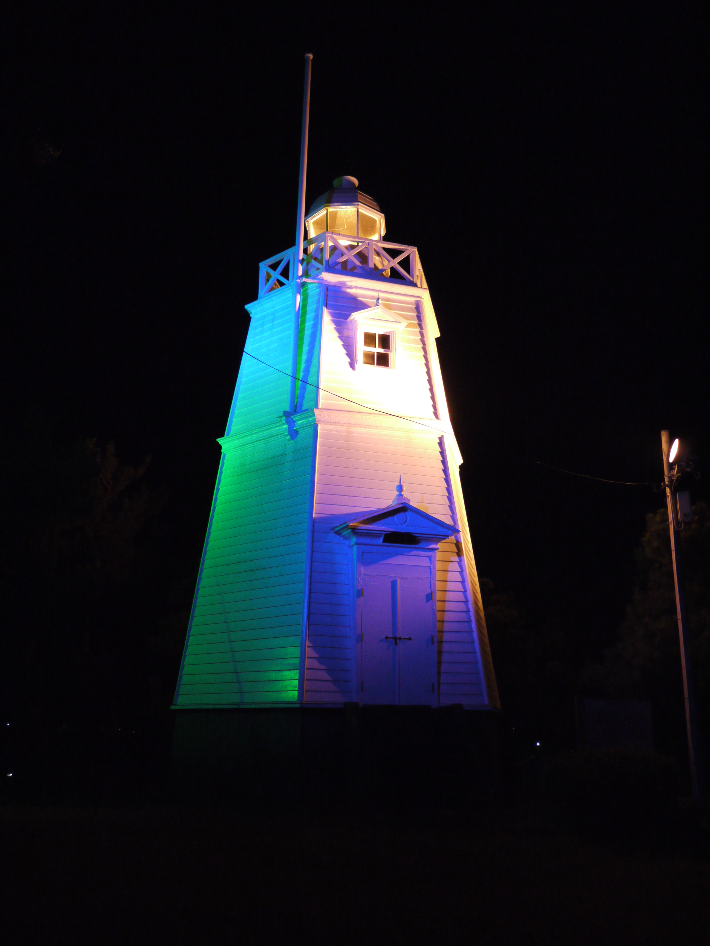 初代酒田灯台(ライトアップ中)